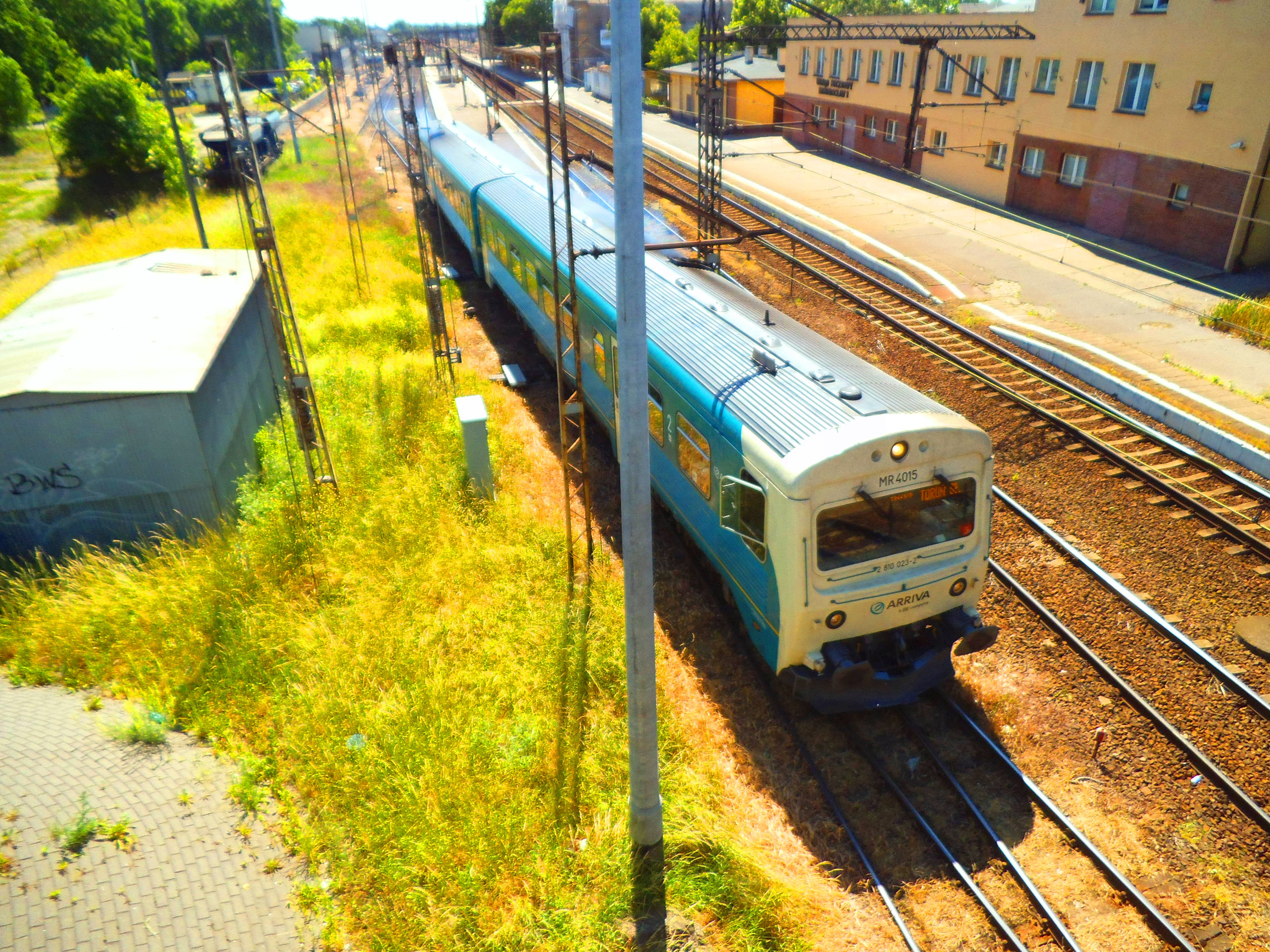 Inowrocław (stacja kolejowa)8